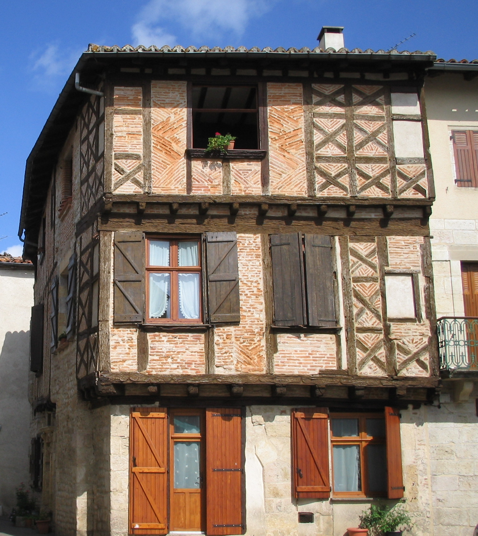 Maison à colombages à Montricoux (Tarn-et-Garonne, France).